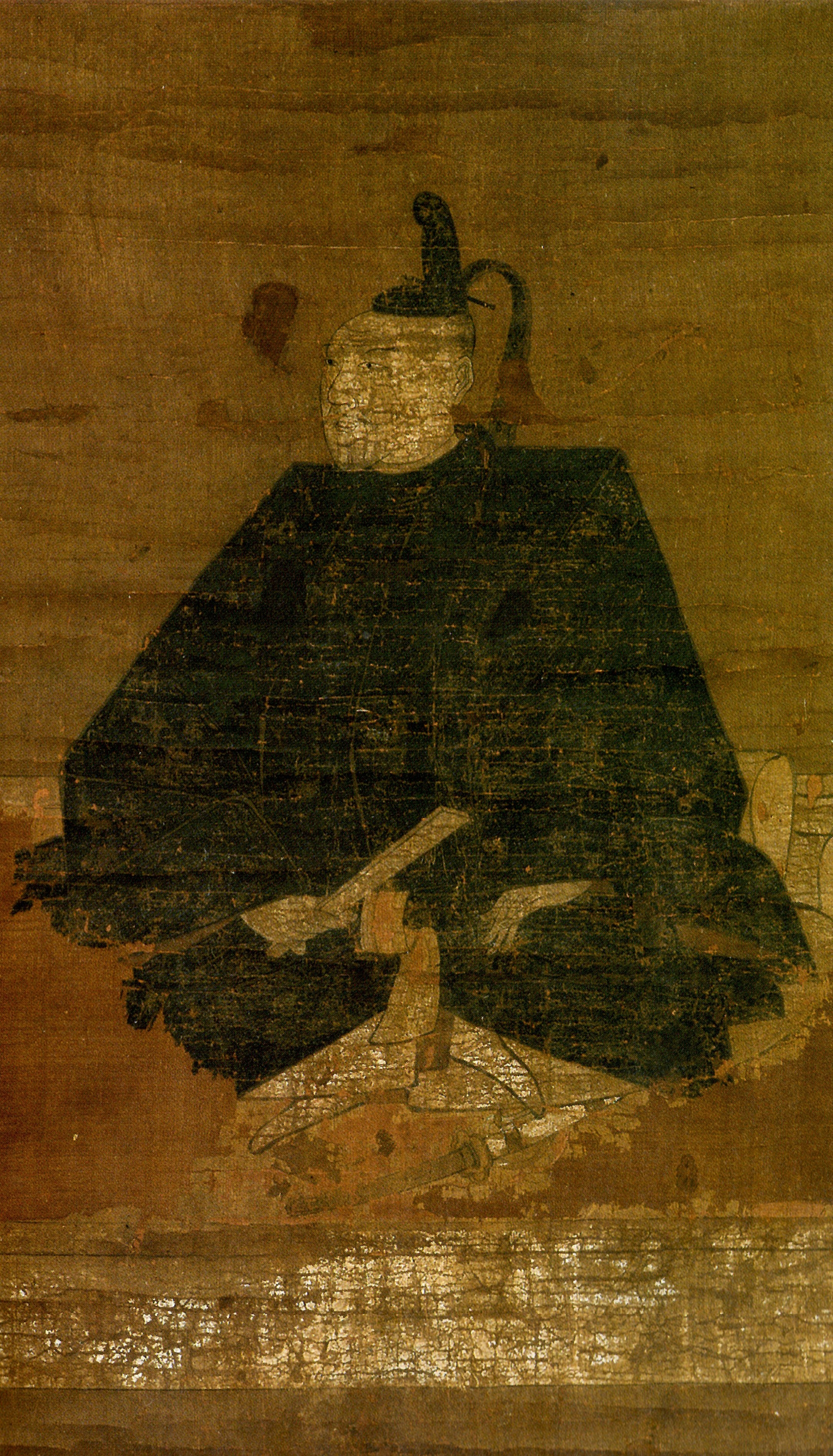 田中吉政の肖像。